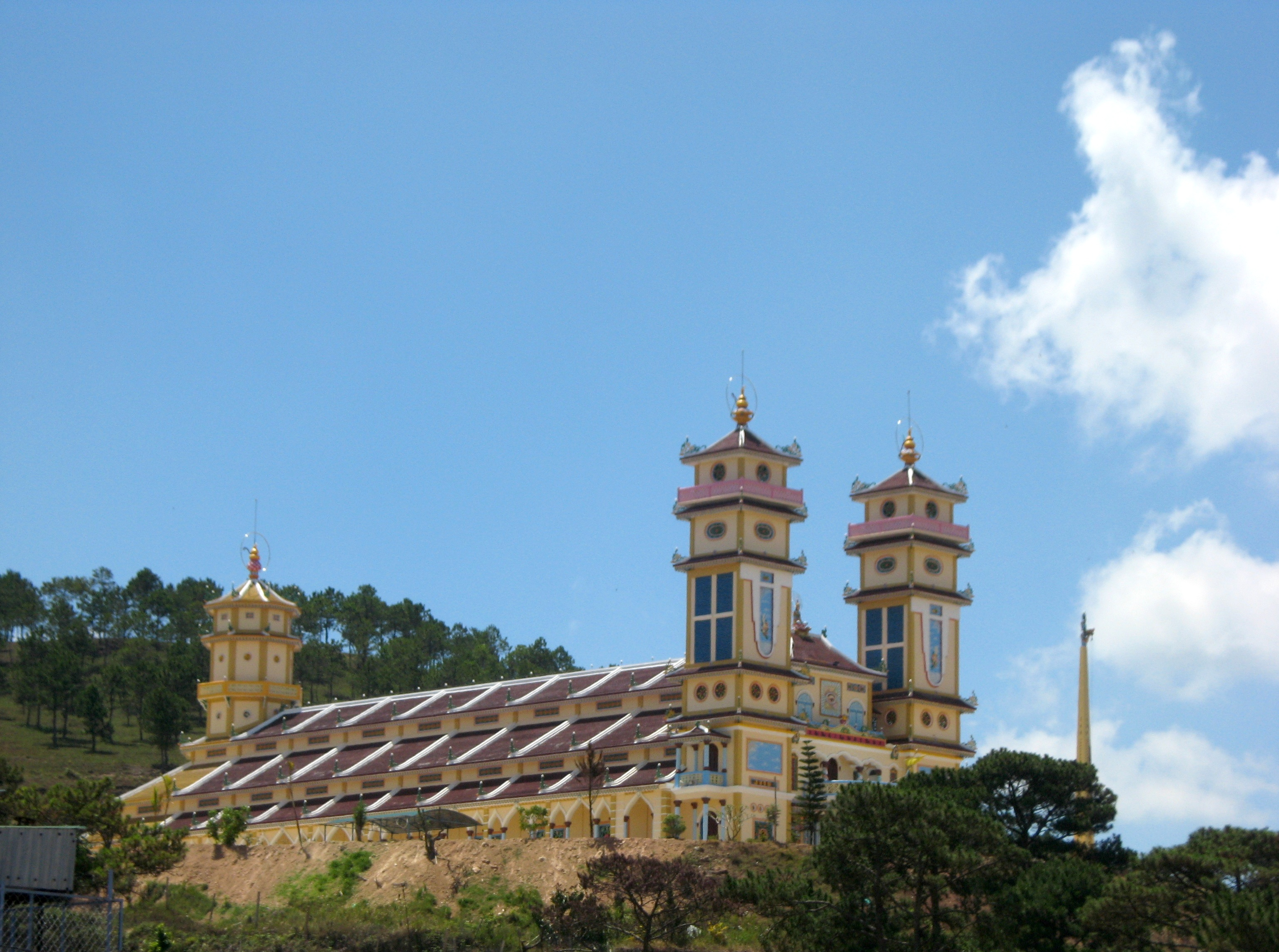 Thanh that Da Phuoc